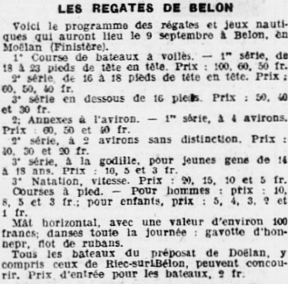 Programme des régates de Belon organisées le 9 septembre 1923 (journal L'Ouest-Eclair du 4 septembre 1923)